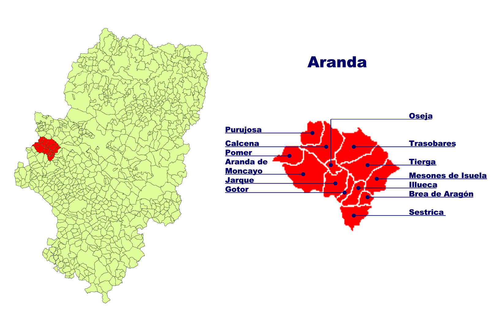 Comarca de Aranda Creado el 07.10.2005 por Ecelan en base a Image:Aragon municipalities.png